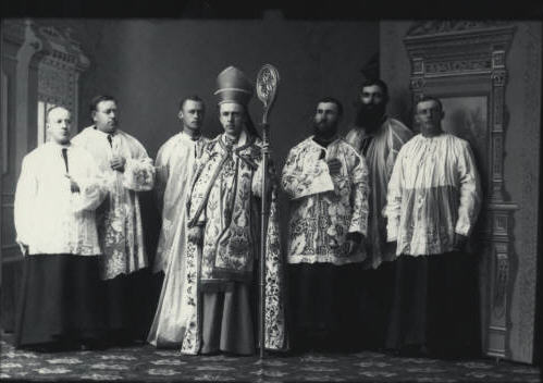 Otto Zardetti und weitere Theologen